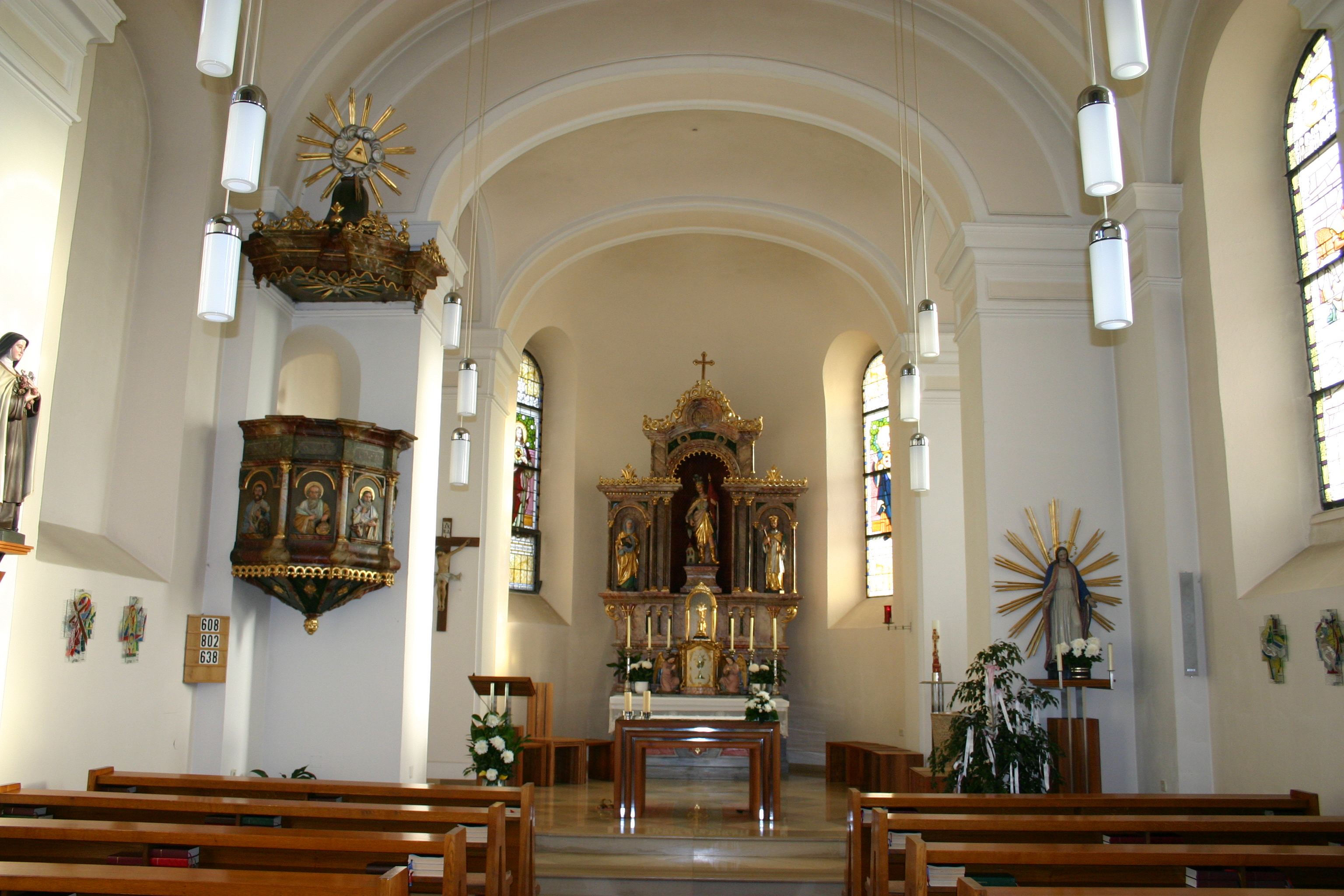 Rudersdorf, Innenansicht der römisch-katholischen Pfarrkirche